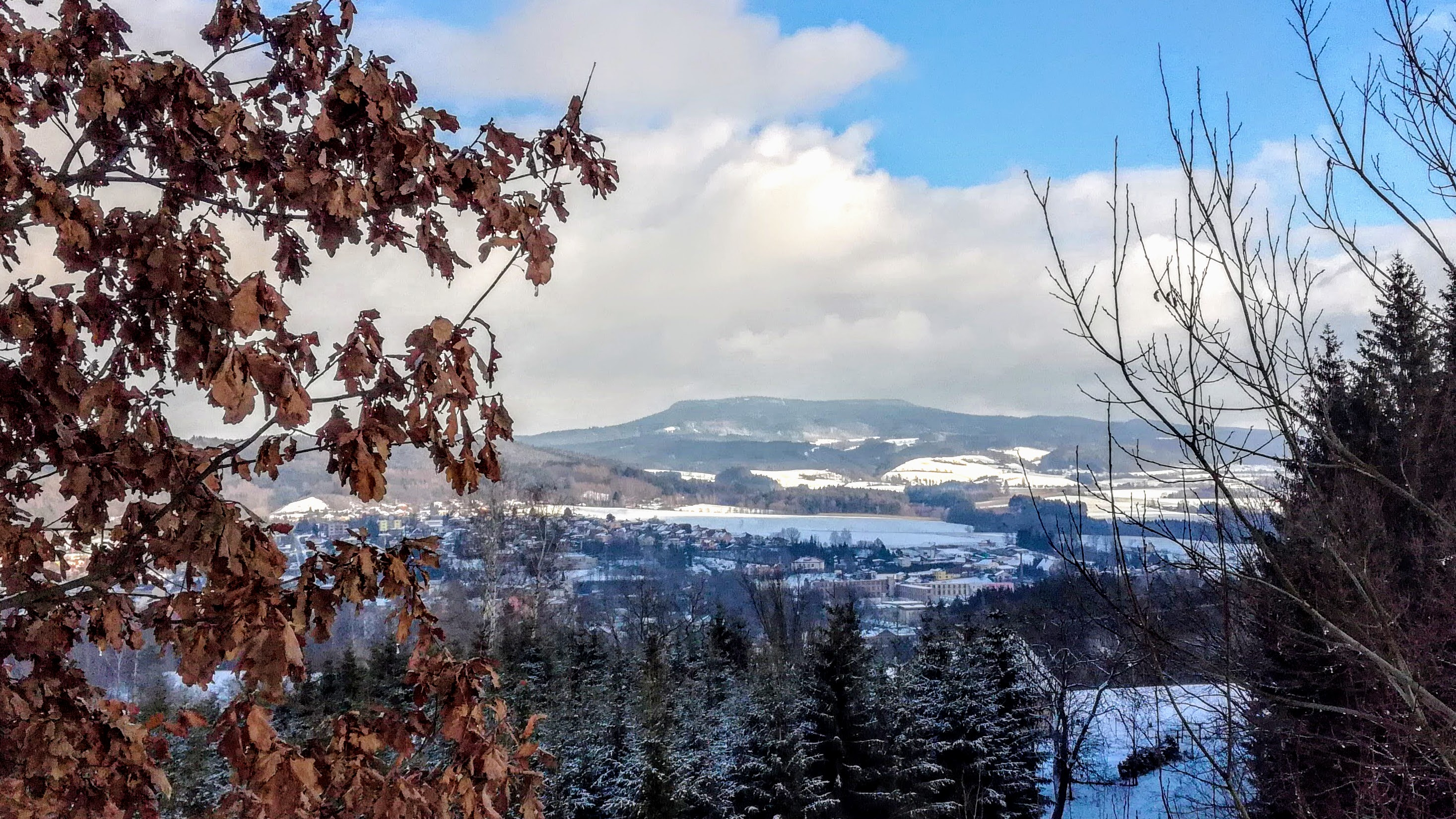 Hora Bor nad Hronovem, záběr východním směrem z Červenokostelecké pahorkatiny cestou na Studénka